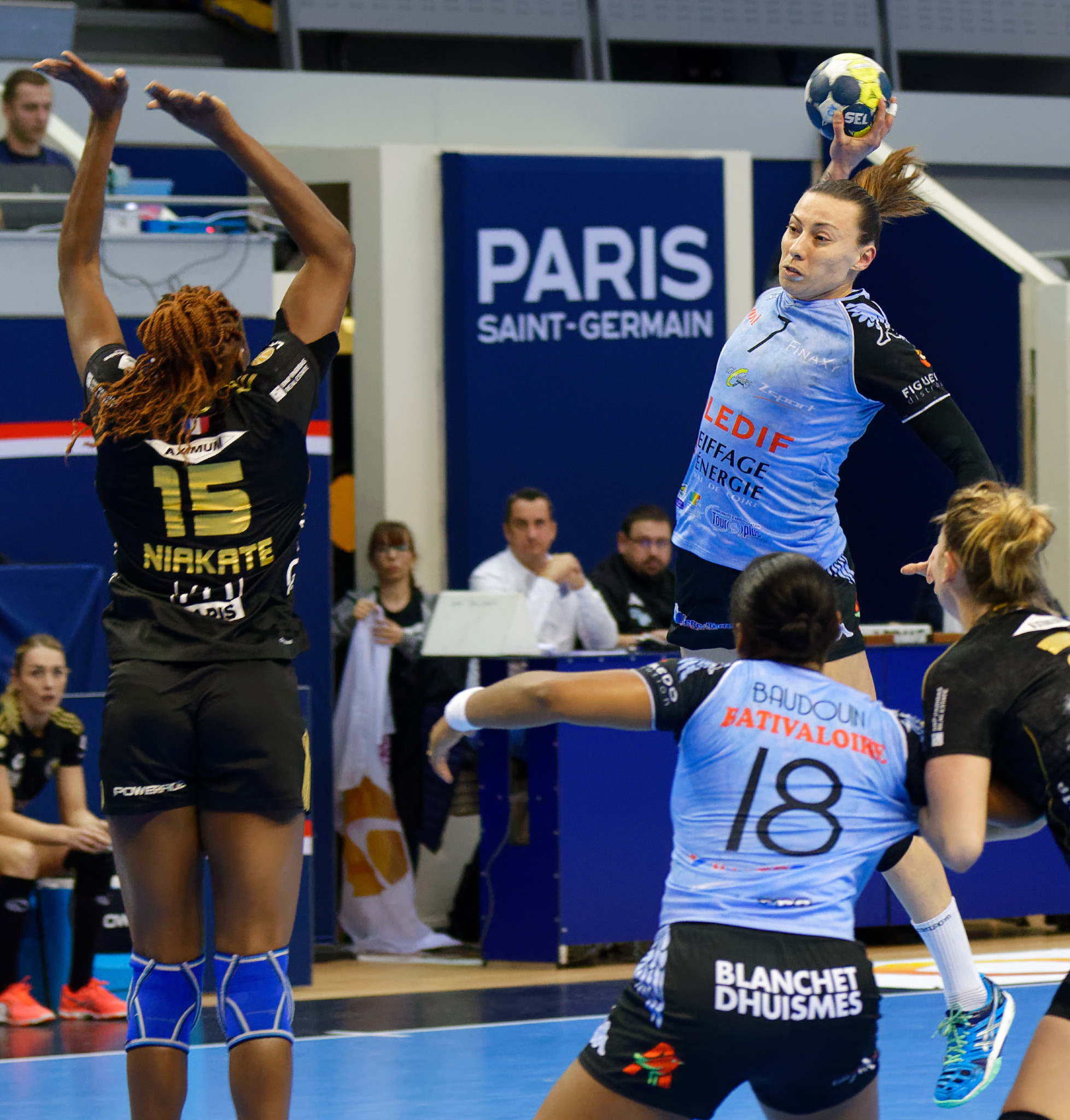 Rencontre Issy Paris Hand / Chambray. A Coubertin, le 26 février 2017.